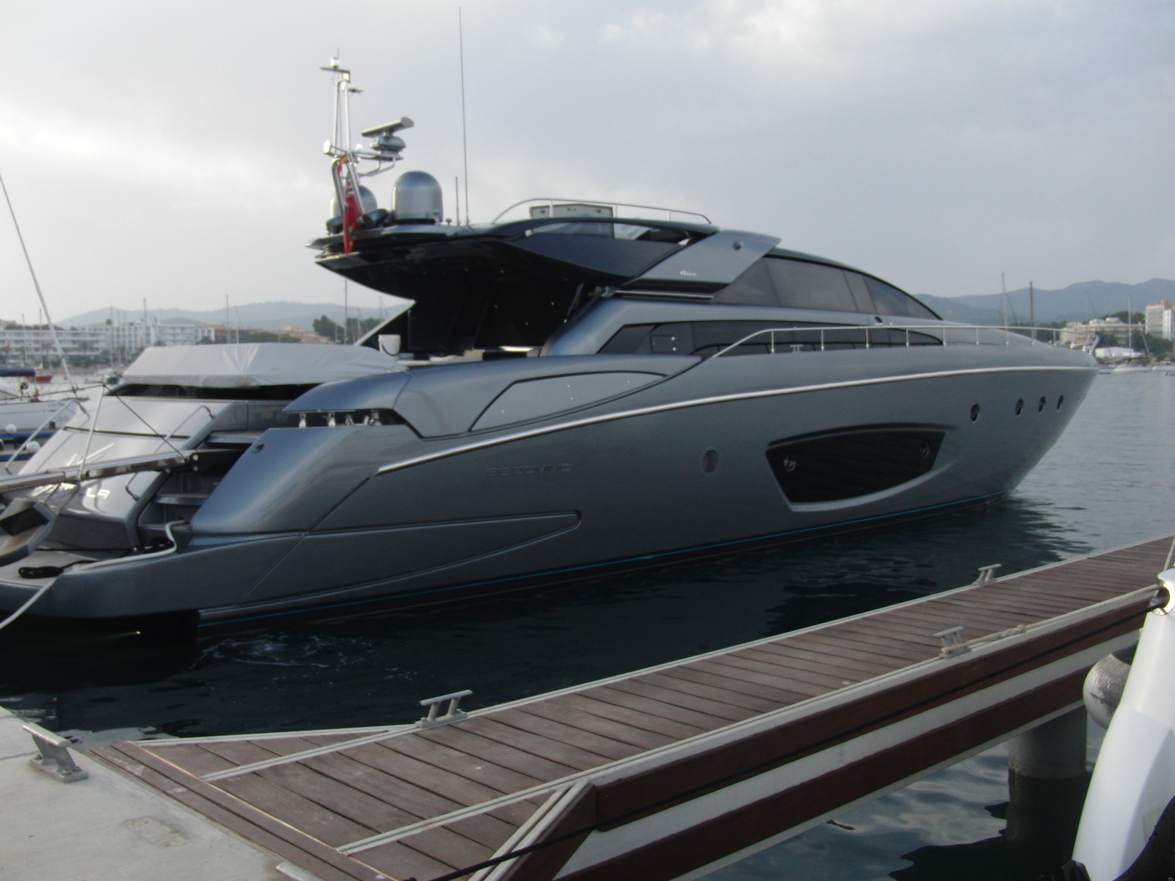 Moderne Riva-Yacht, 86' Domino